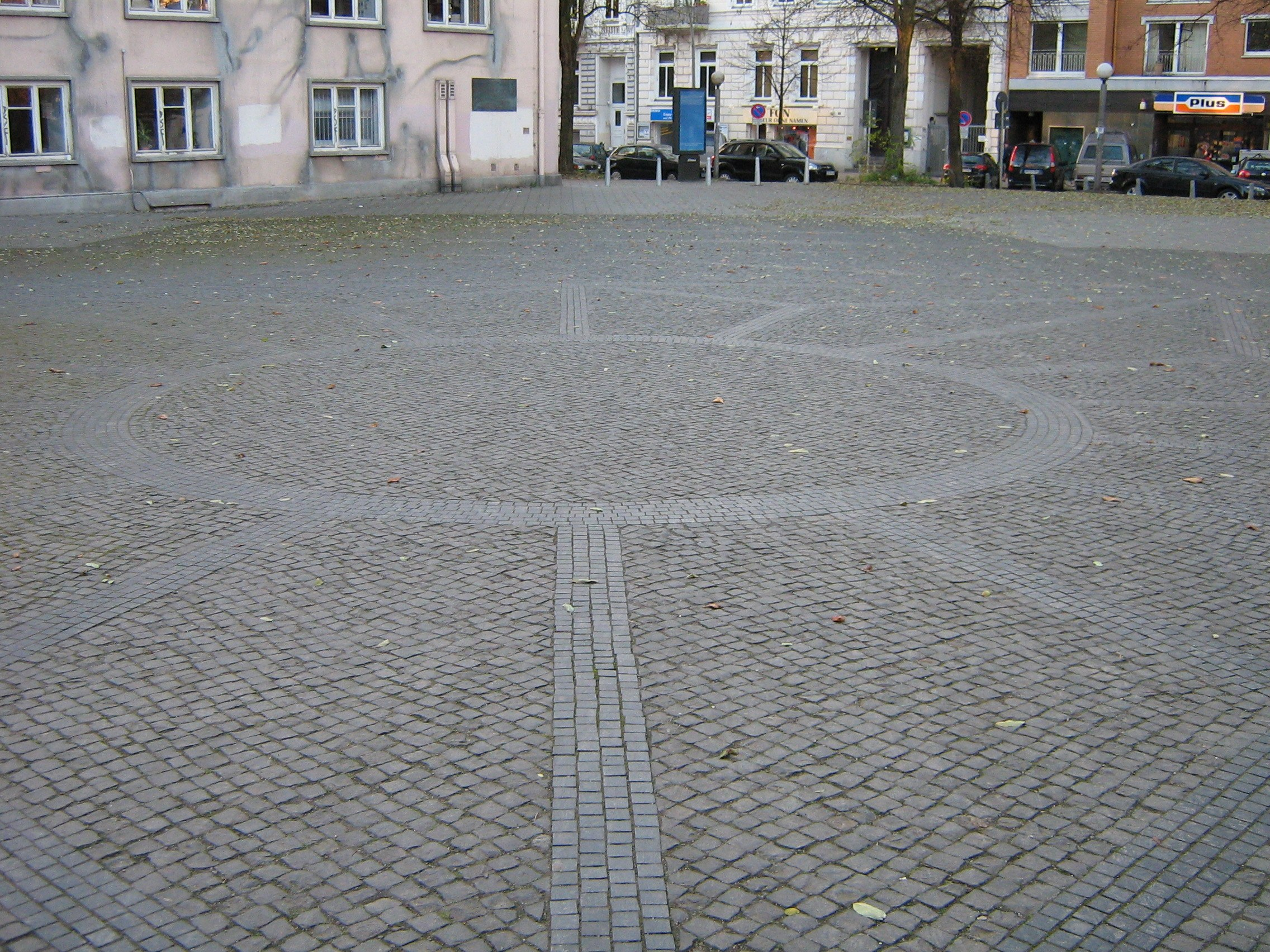 Joseph-Carlebach-Platz, Grindelviertel Hamburg.